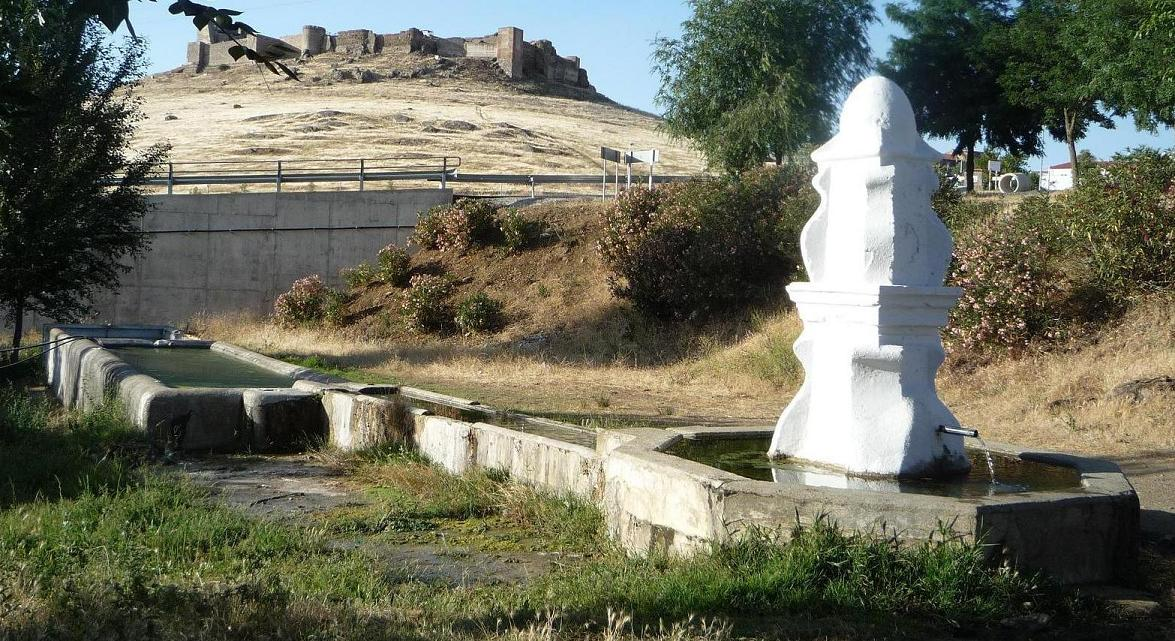 Montemolín abrevadero de Pilar Redondo